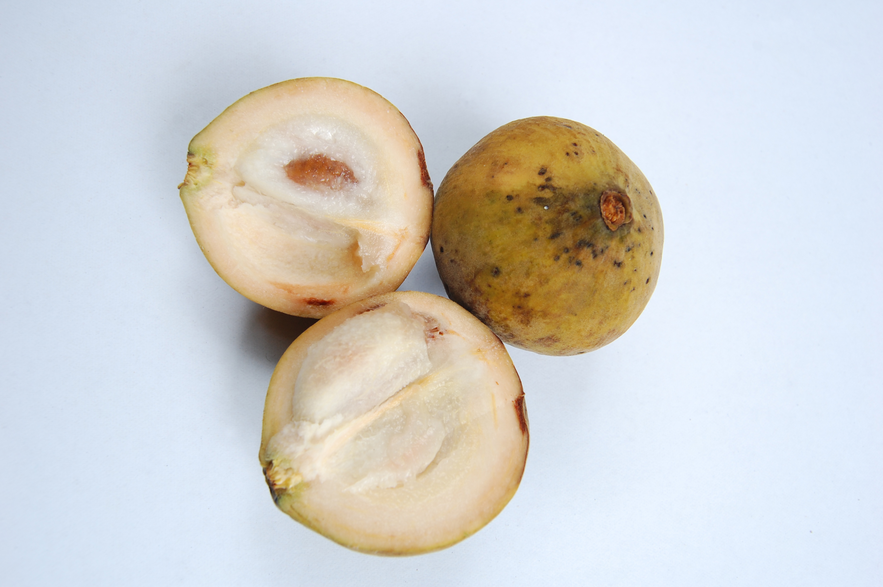 Kecapi (bahasa Indonesia), Kechapi (Mal), Santol Fruit (English), Sandoricum koetjape